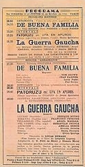 Foto de un programa de cine de La Guerra Gaucha (1942), de Lucas Demare.